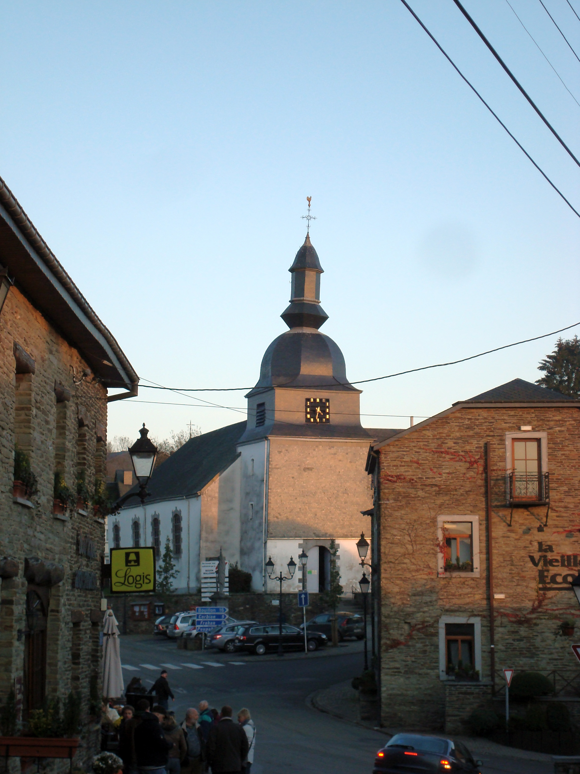 Eglise paroissiale Saint-Firmin de Rochehaut. Vue éloignée.